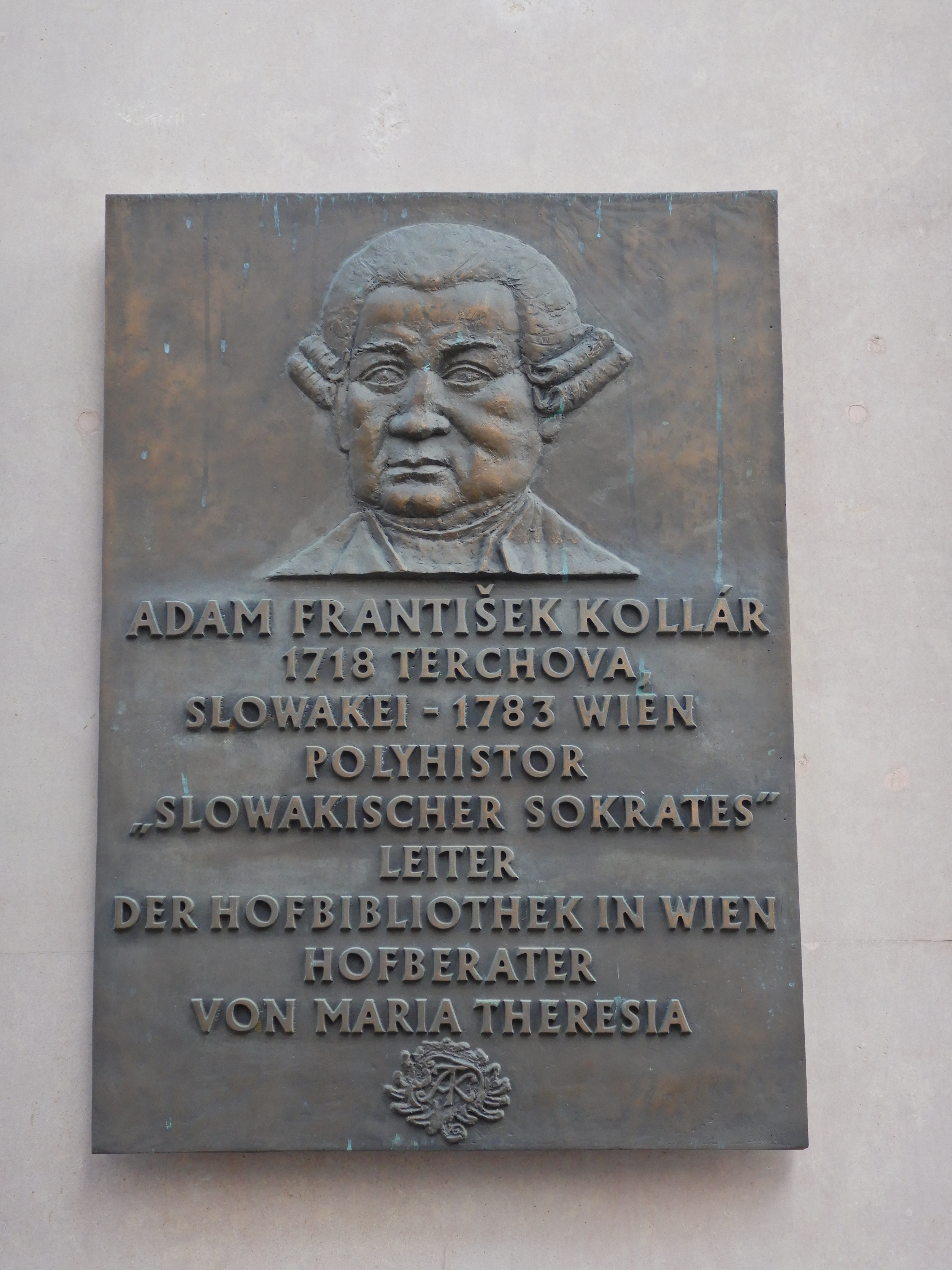 Gedenktafel für Adam František Kollár (Wien, Wipplingerstraße 24 - 26)